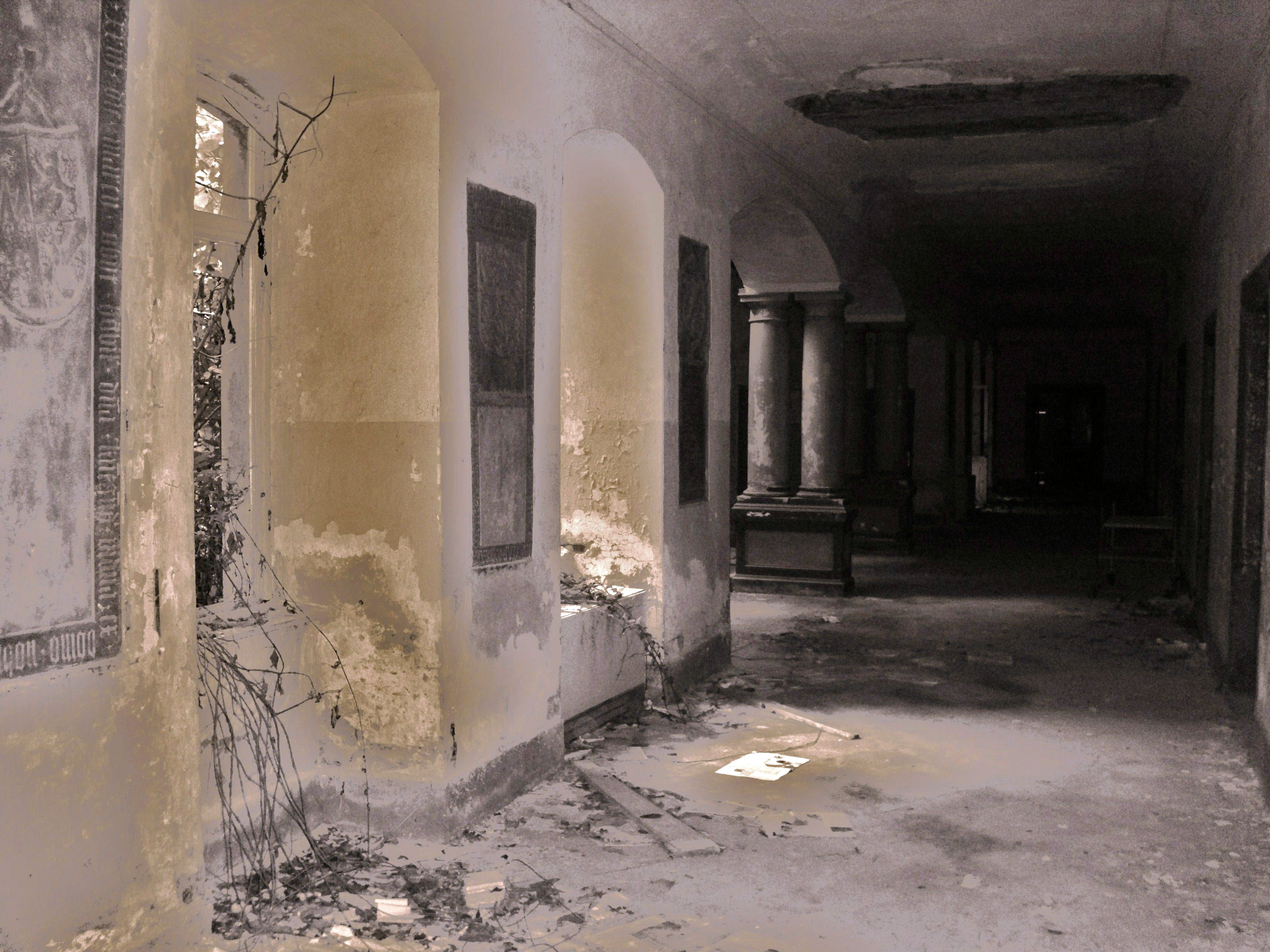 LostPlaceBoppard